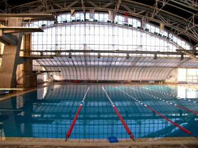 Complejo Natatorio.